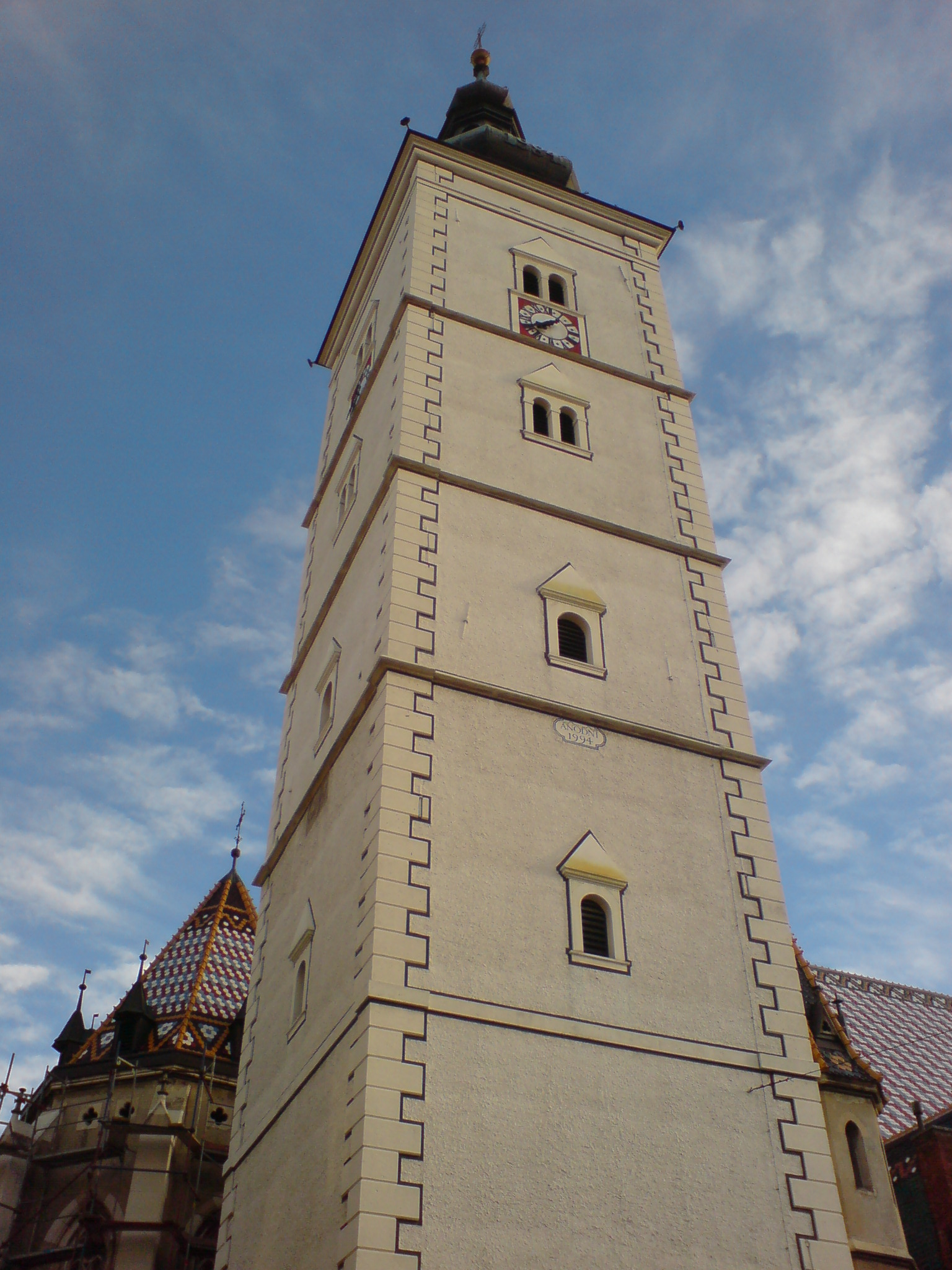 Zagreb